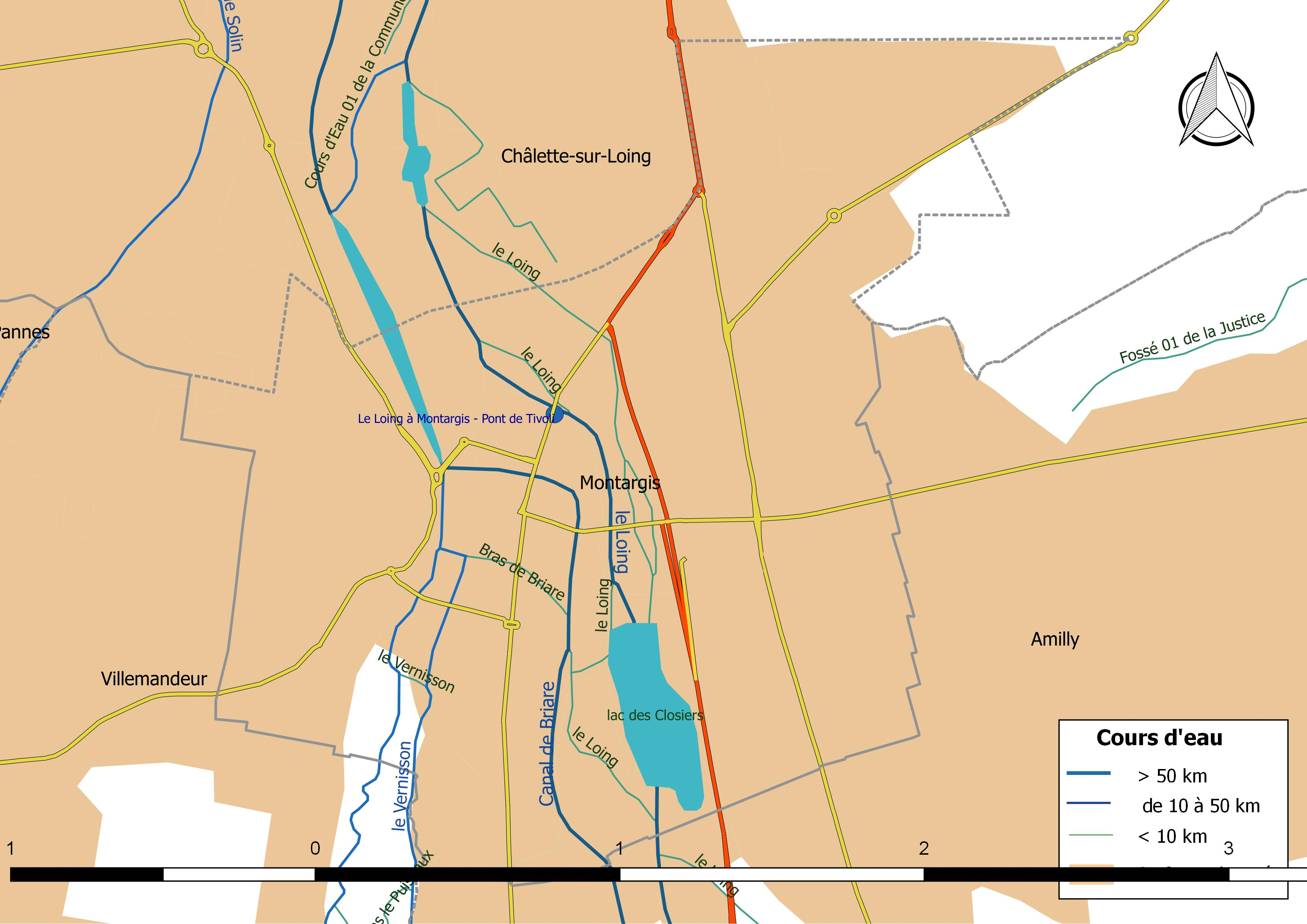 Carte du réseau hydrographique de la commune de Montargis (France).